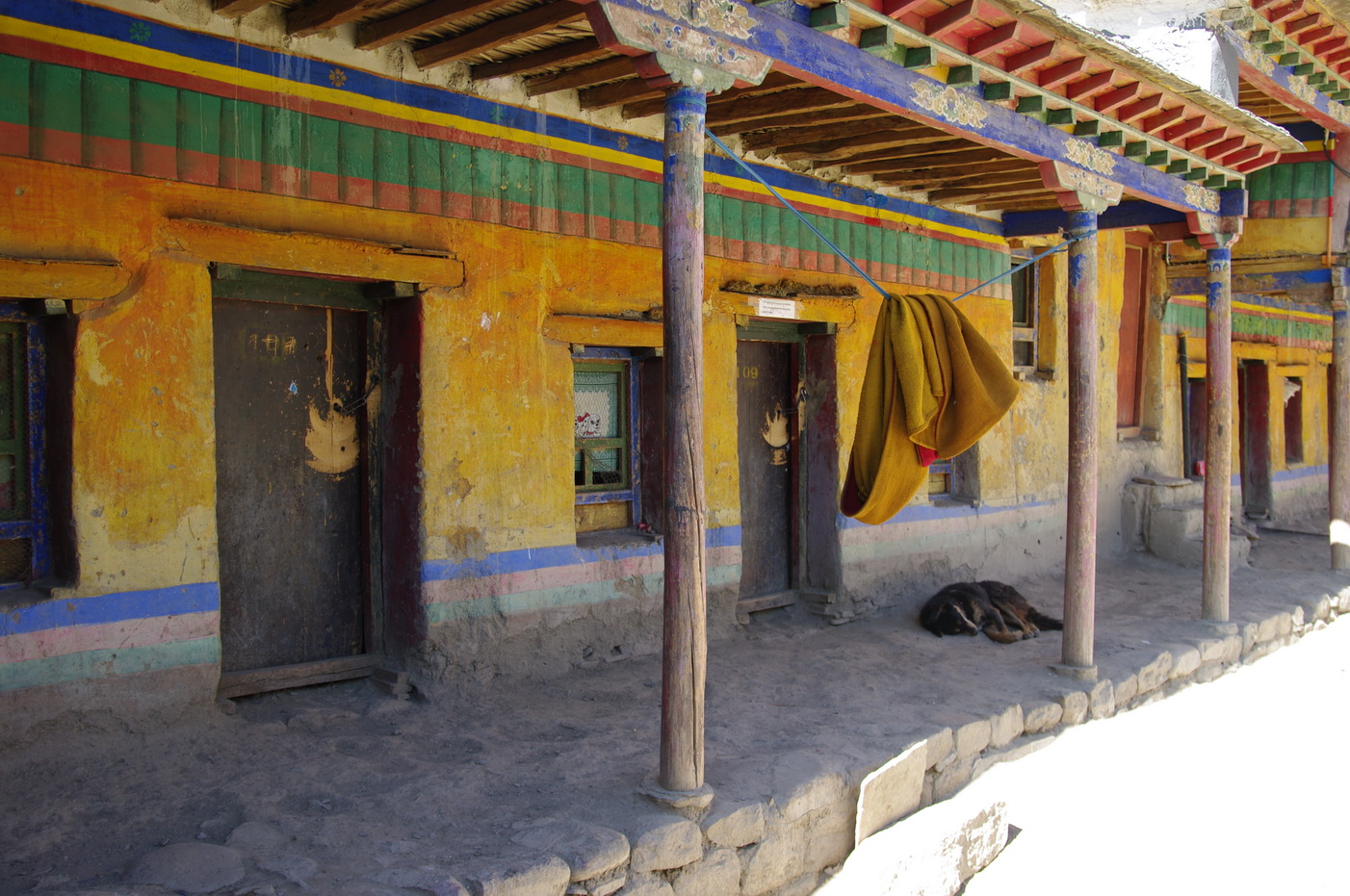 Mönchsunterkünfte im Südkloster Sakya